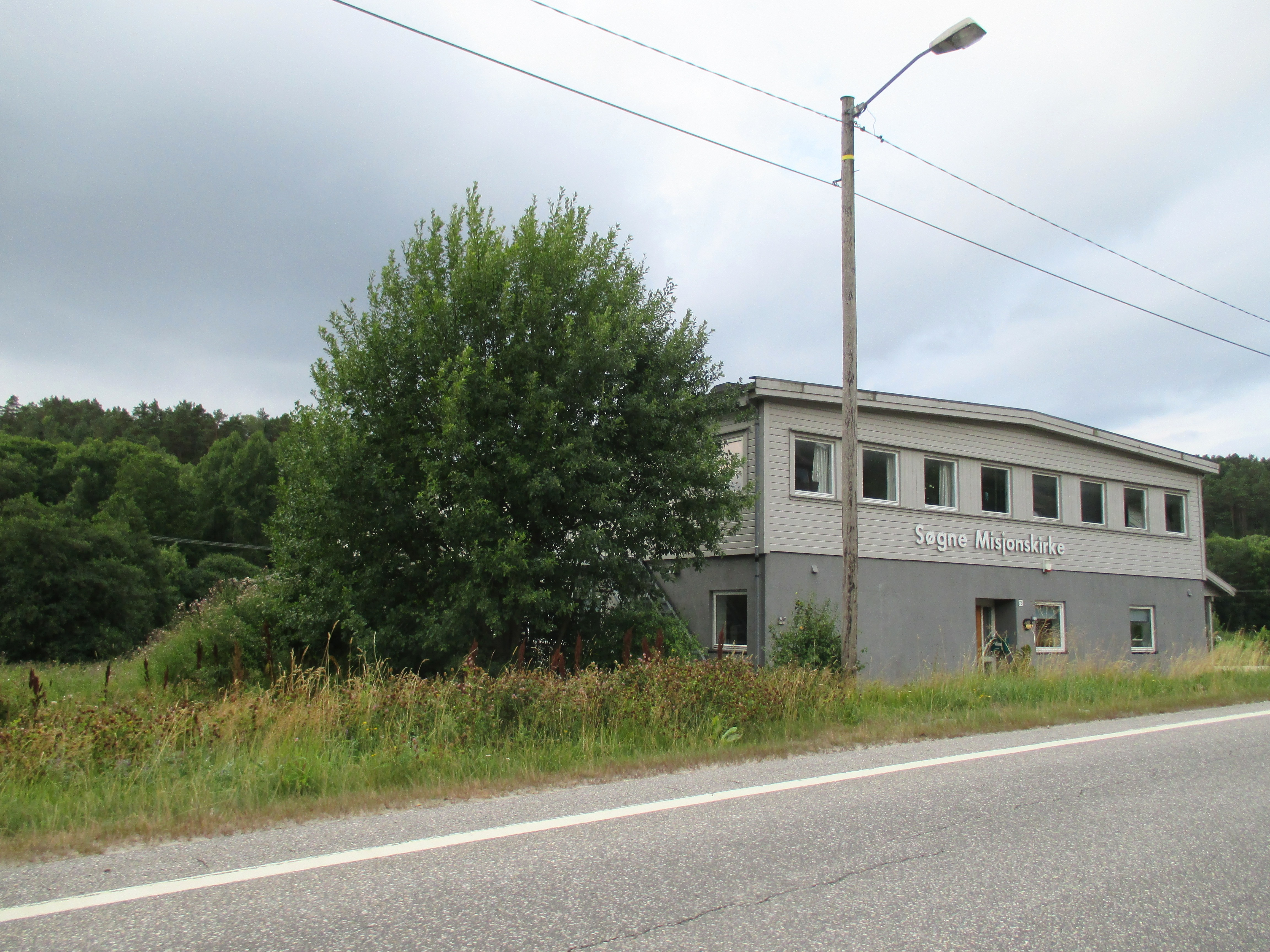 Søgne misjonskirke med fylkesvei 114 foran